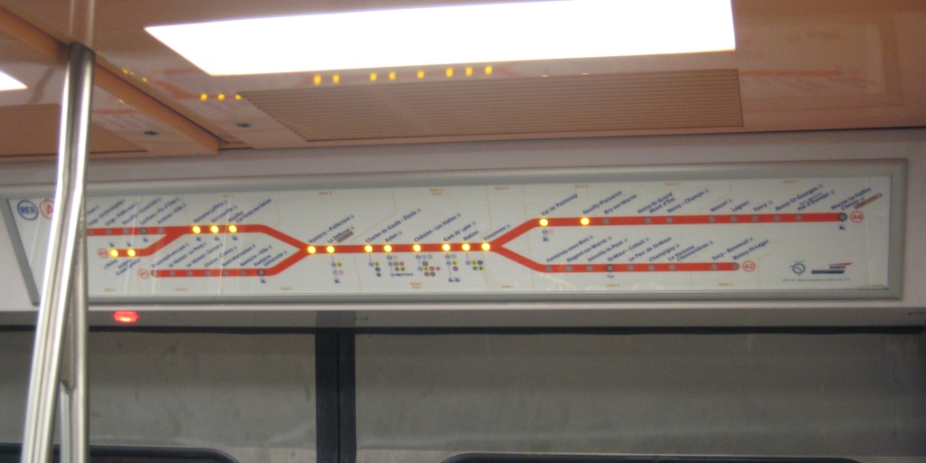 Système d'information SISVE dans un MI 2N du RER A d'Île-de-France Resolution as been lowered to preserve map copyright.